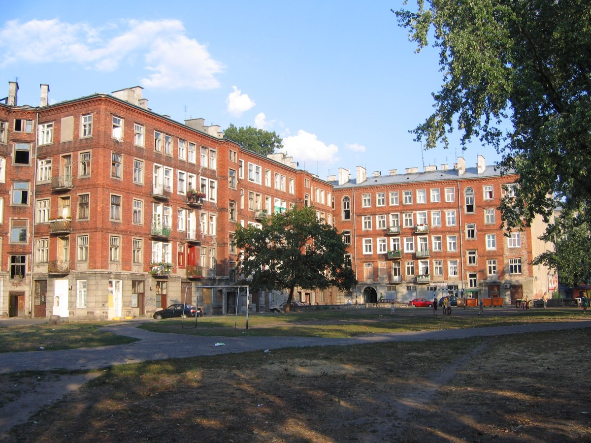 Warszawa, Nowa Praga, budynki wokół dawnego bazaru Pachulskiego